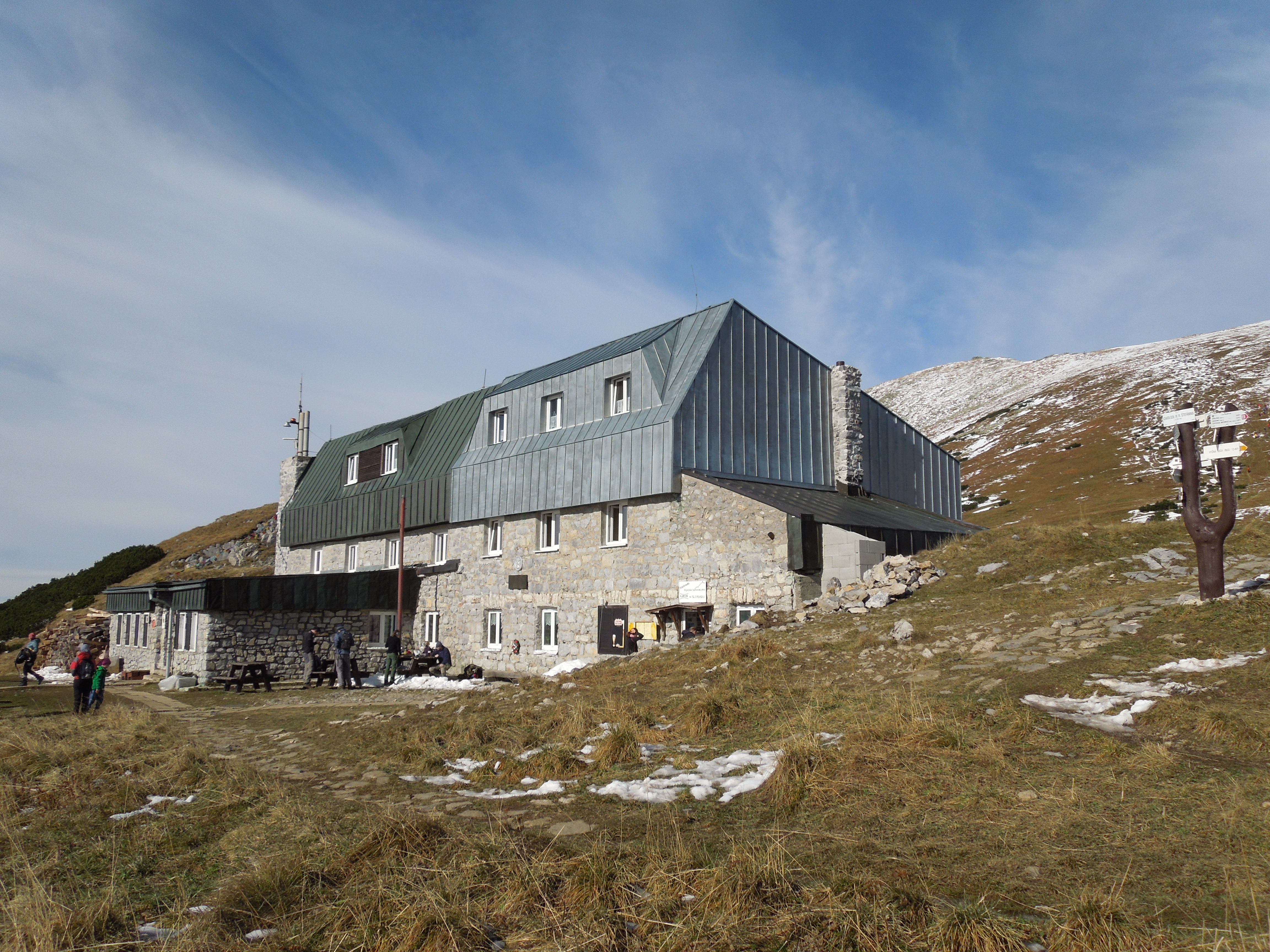 Chata generála Milana Rastislava Štefánika v sedle pod Ďumbierom